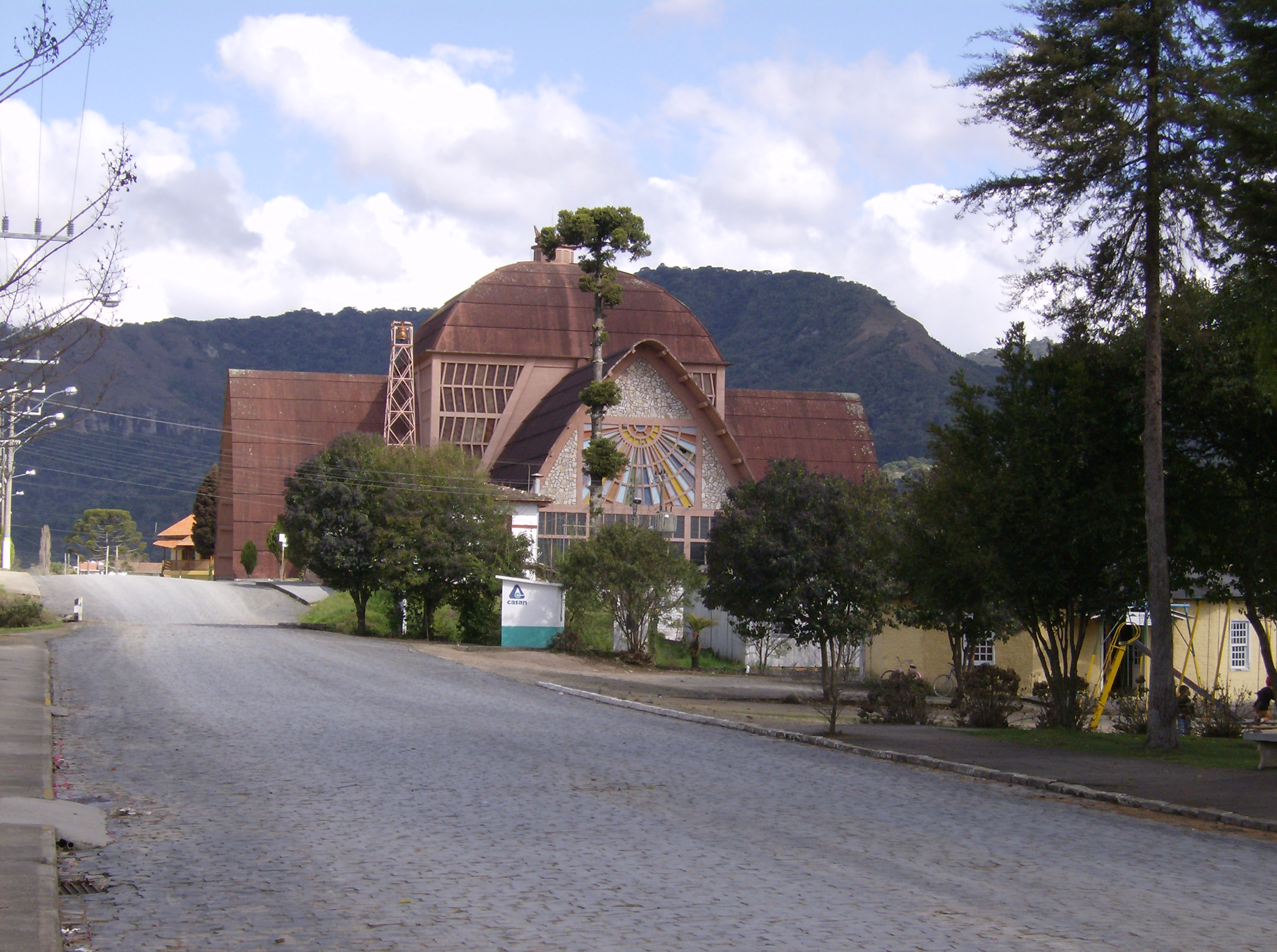 Urubici, Santa Catarina state, Brazil